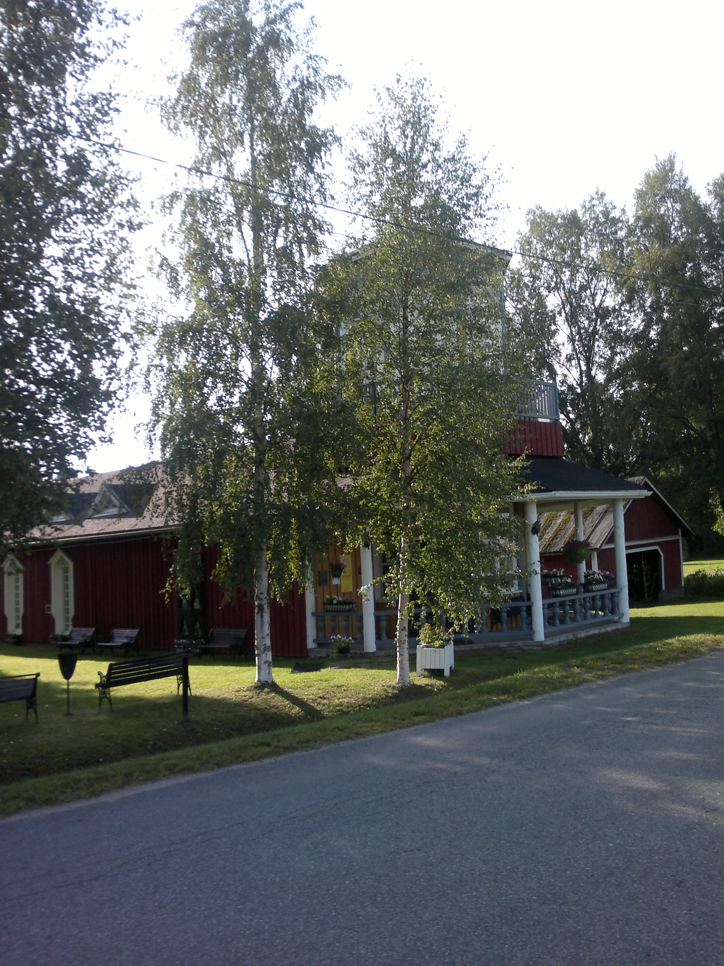 Soile Yli-Mäyryn taidehalli Mäyryn kylässä, Kuortaneella.